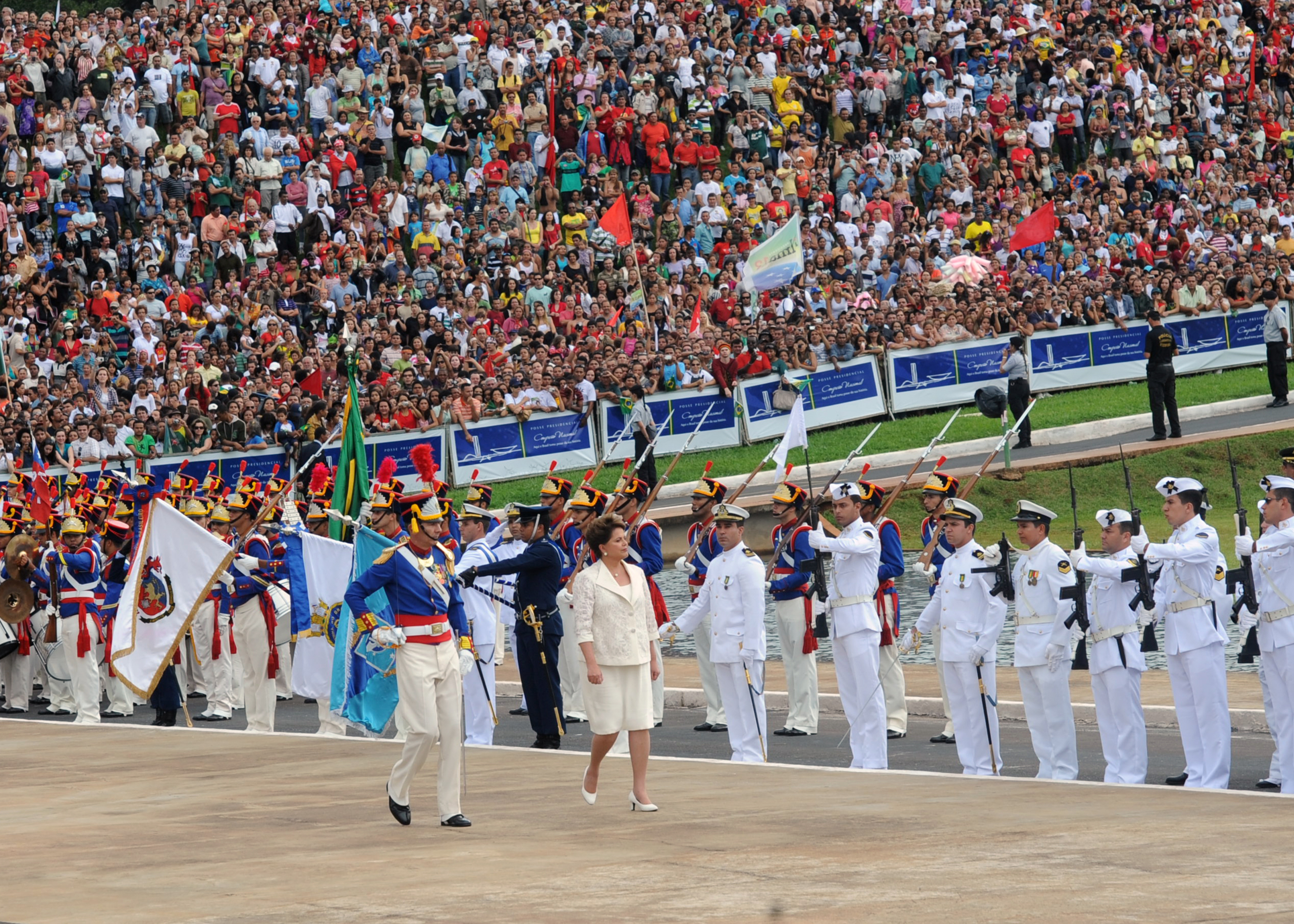 A presidente Dilma Rousseff passa em revista as tropas do Exército, Marinha e Aeronáutica, ato no qual se torna comandante-em-chefe das Forças Armadas do Brasil. Brasília, 1º de janeiro de 2011.